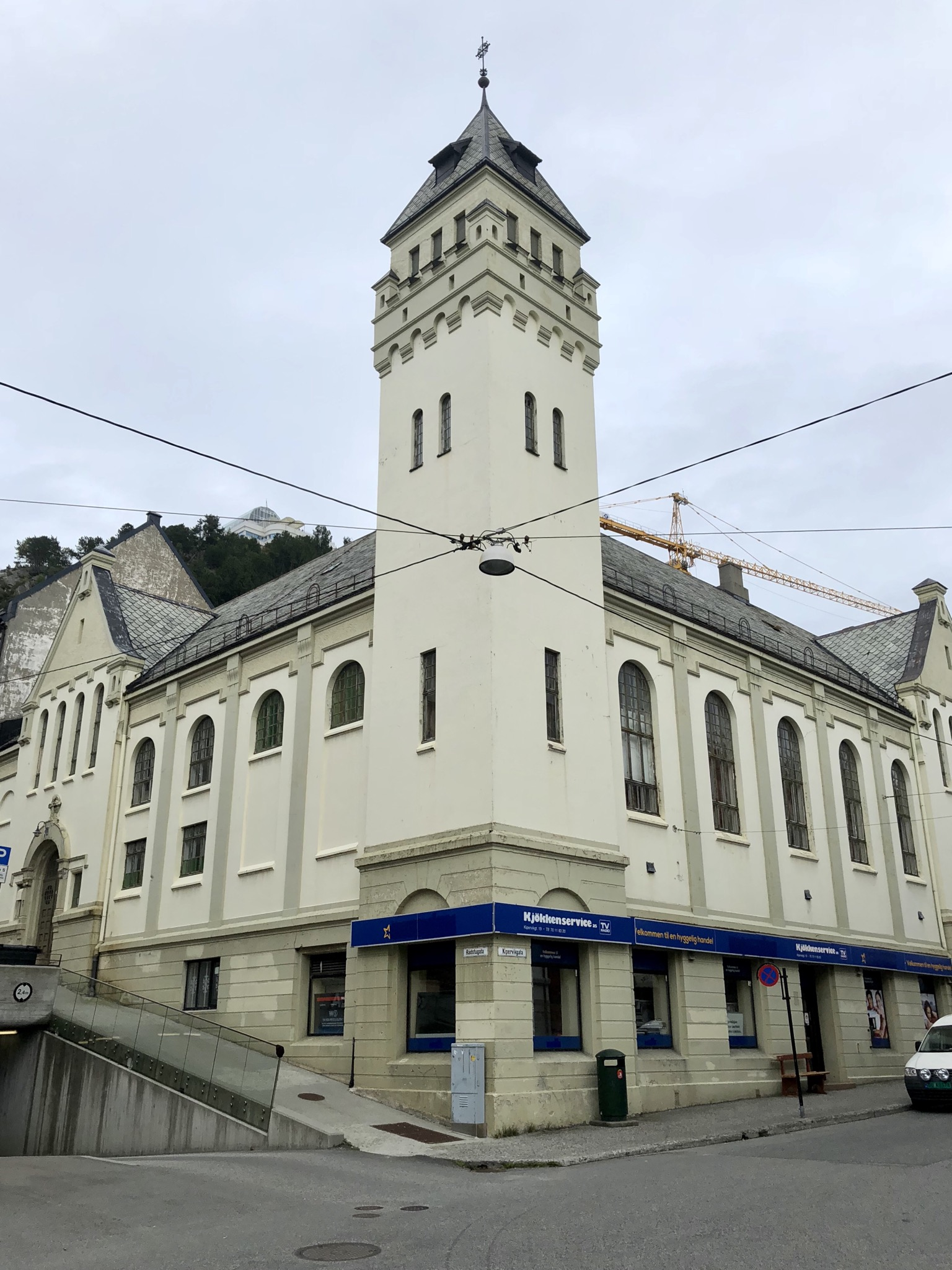 Bethaus in Ålesund